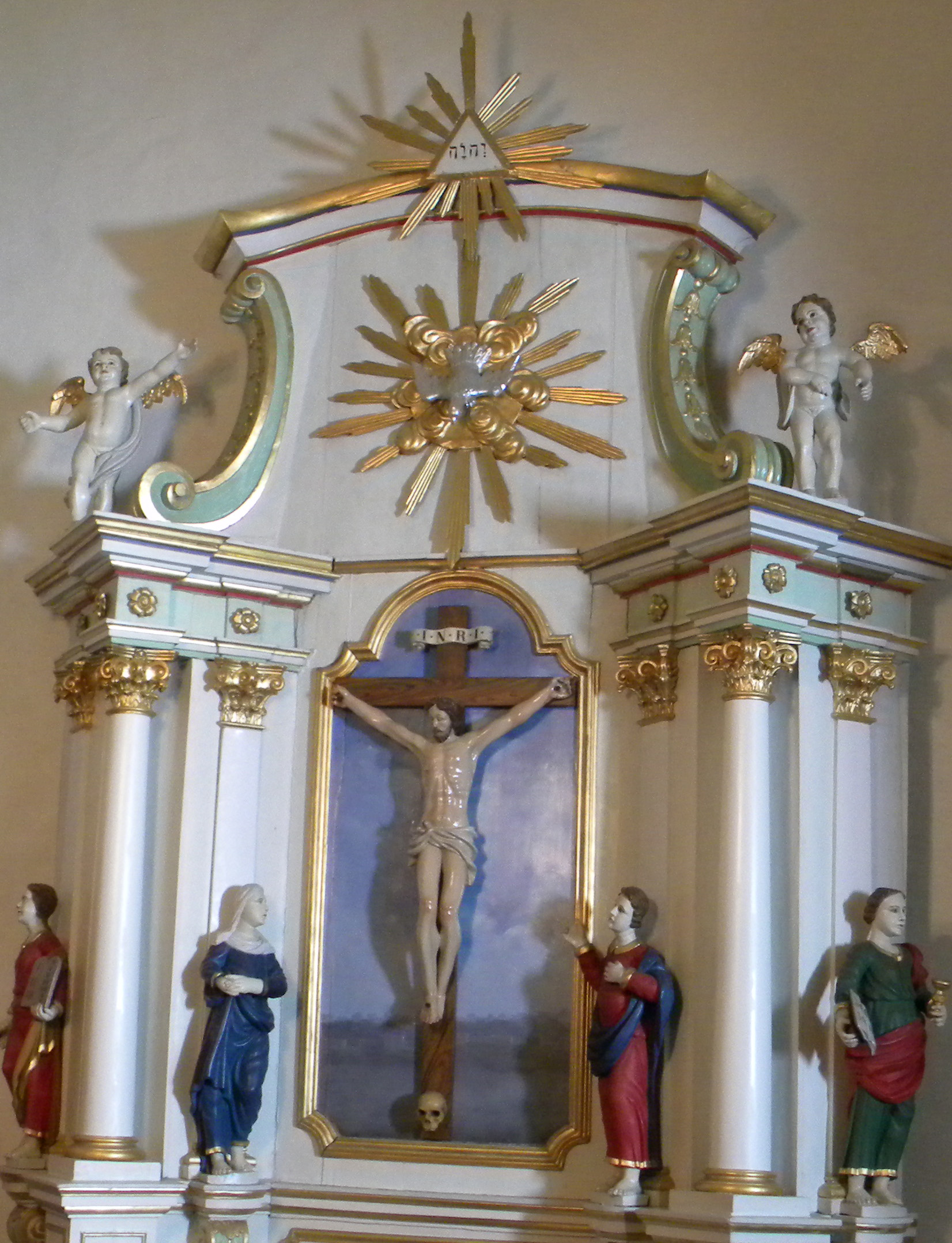 Altarkrön med tetragrammet JHWH i Veinge kyrka